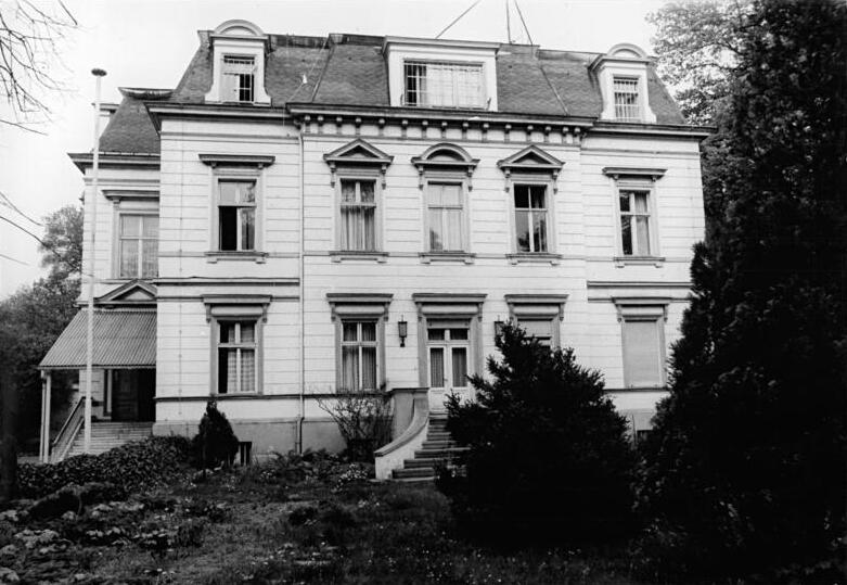 Berlin, Bulgarische Botschaft ADN-ZB Schneider 3.1.87-Qua-Berlin: Botschaft der Volksrepublik Bulgarien in der Berliner Straße.